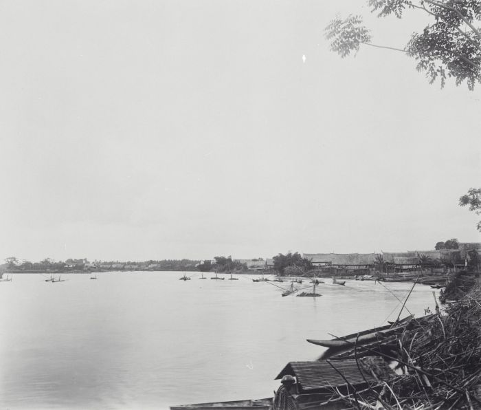 Foto. De Walanae-rivier bij Singkang onderafdeling Wadjo en Bone op Celebes